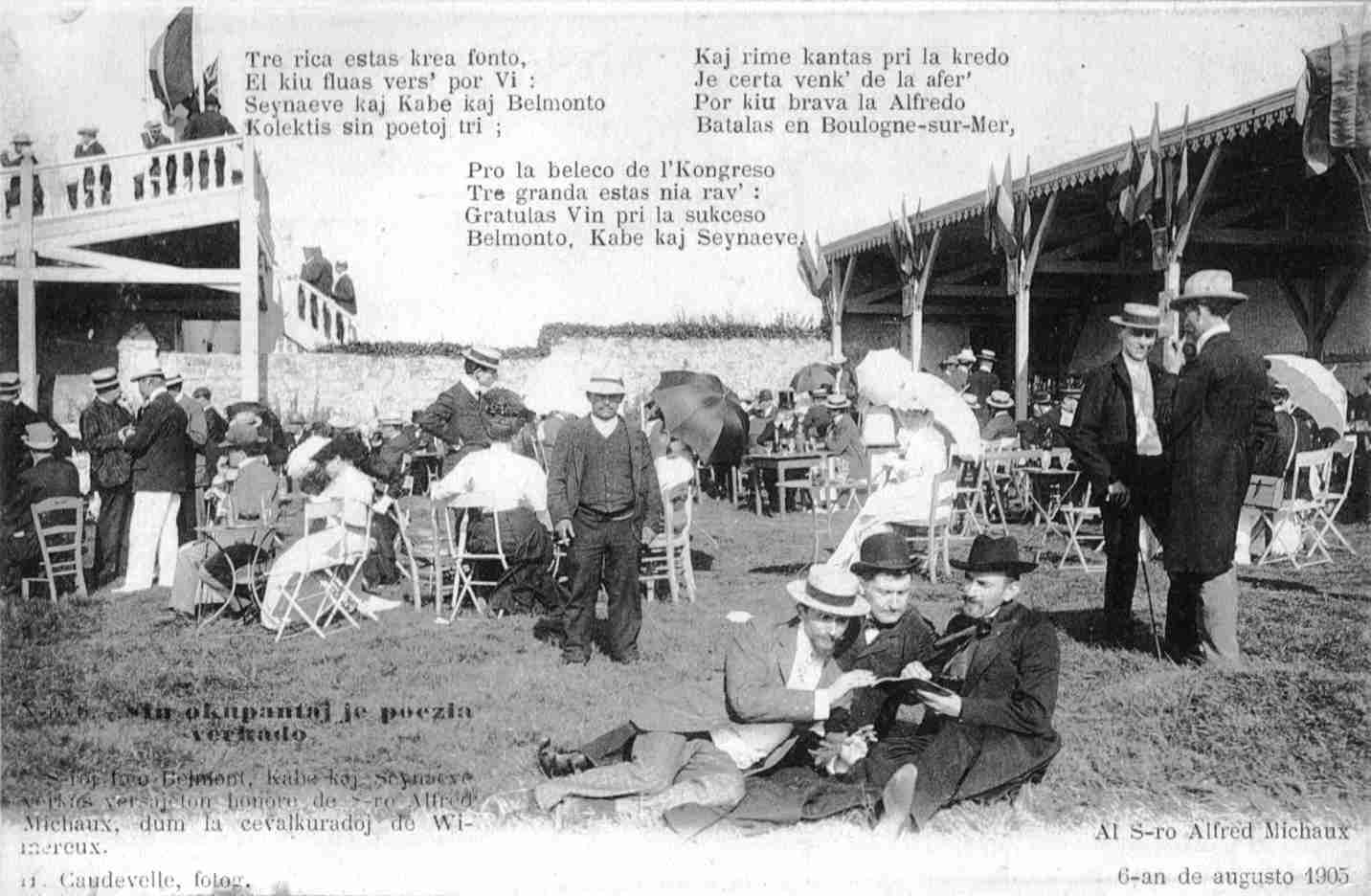 Esperantista Kongreso de Boulogne-sur-Mer. Poŝtkarto 6: Sin okupantaj je poezia verkado, 6 Aŭgusto 1905. S-roj Leo Belmont, Kabe kaj Seynaeve verkas versaĵeton honore de S-ro Alfred Michaux, dum la ĉevalkuradoj de Wimereux.